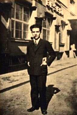 Václav Lacina, 1928, student práv a spolupracovník Divadla DADA